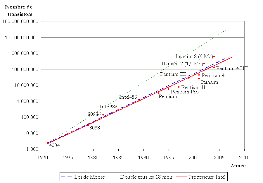 Graphique (en ordonnées logarithmiques) illustrant la loi de Moore par rapport à l'évolution réelle du nombre de transistors dans les microprocesseurs Intel; en pointillés verts au-dessus, représentation de l'hypothèse selon laquelle ce nombre doublerait tous les 18 mois. Catégorie:Schémas